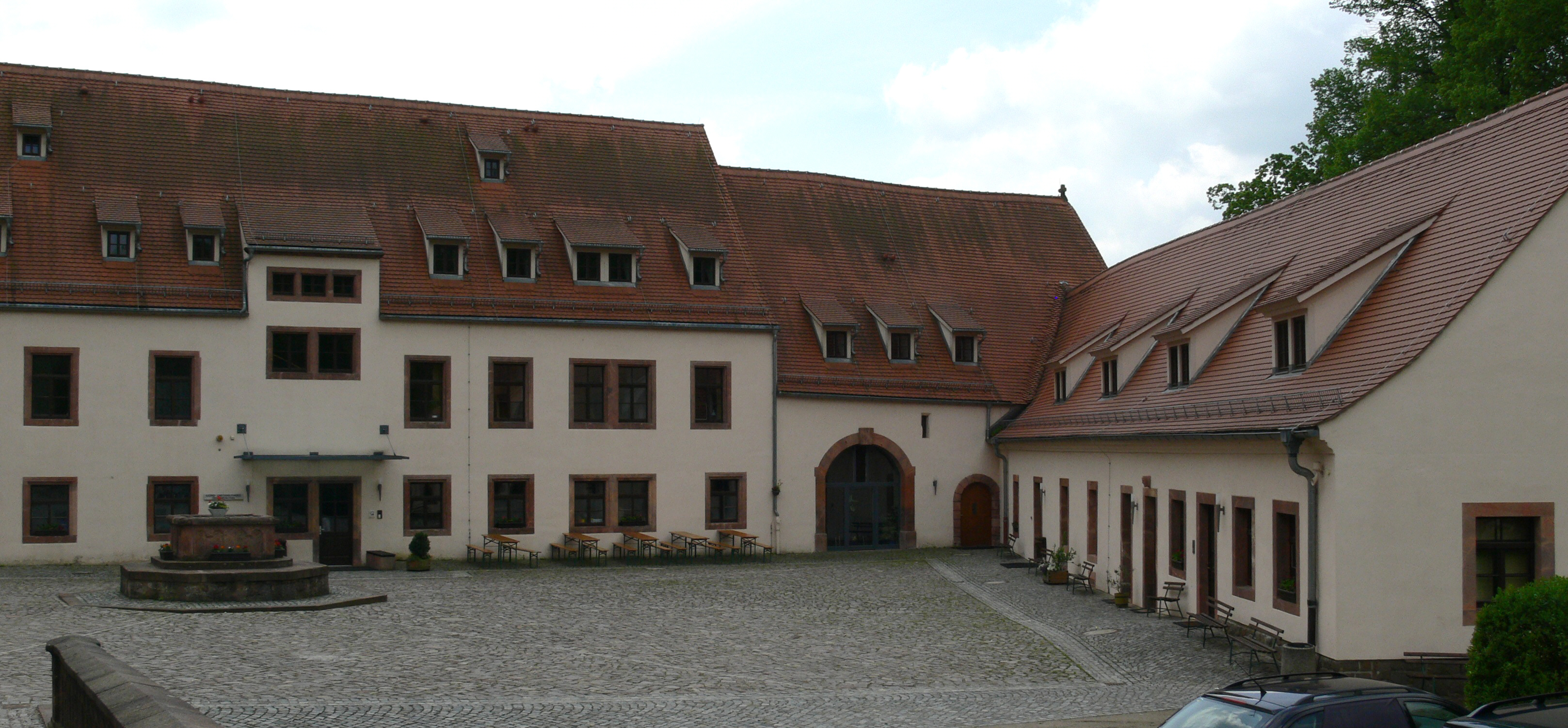 Wechselburg, Landkreis Mittelsachsen: Kloster Wechselburg Klostergebäude und Jugend- und Familienhaus